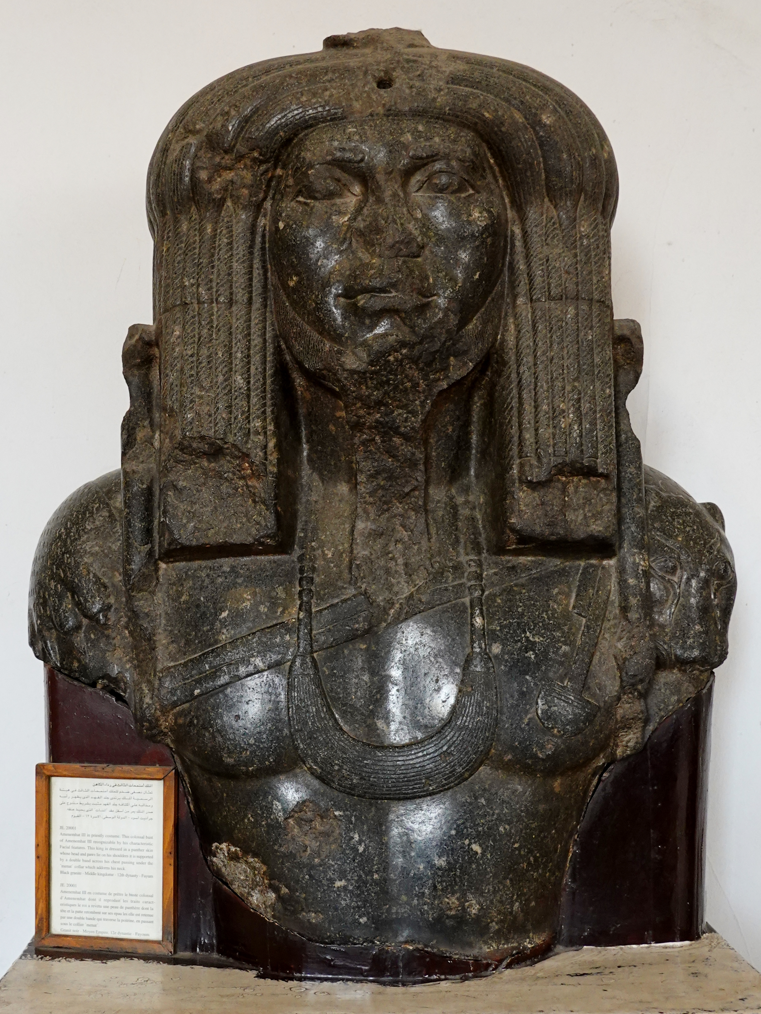 Torso einer Kolossalstatue aus schwarzem Granit des Königs Amenemhet III. aus der 12. Dynastie des Mittleren Reiches (Höhe 100 cm, gefunden 1862 in Schedet/Krokodilopolis (Kiman Fares) in Faijum), ausgestellt im Ägyptischen Museum in Kairo, Ägypten